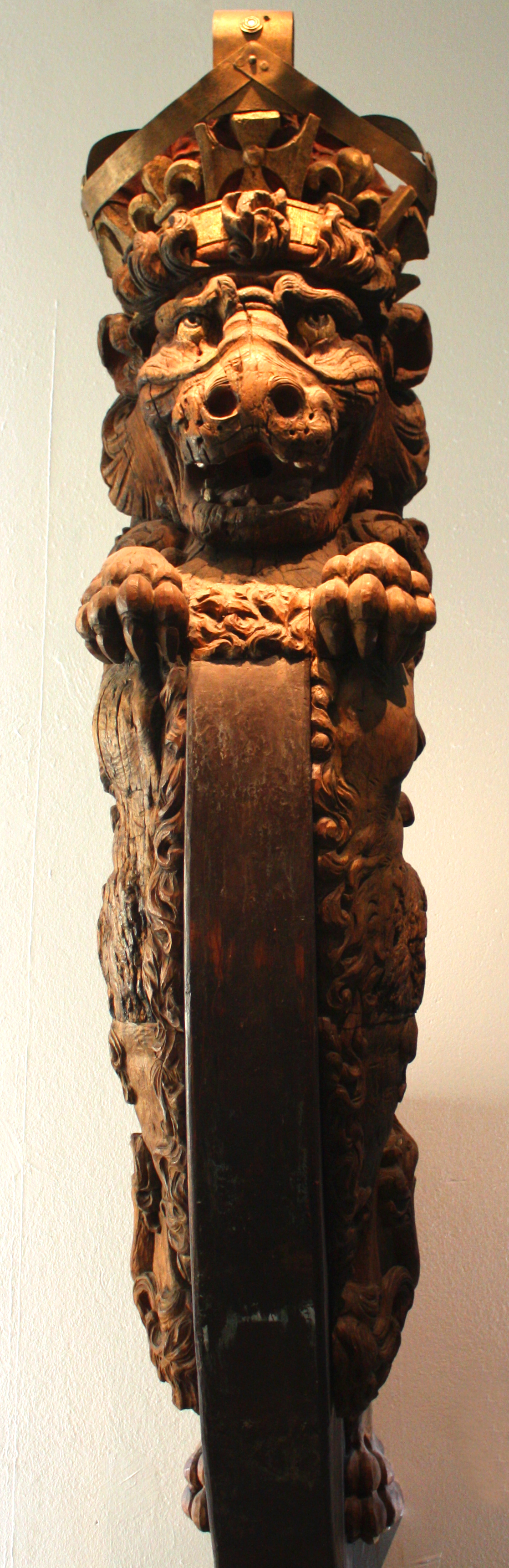 In den 1920er Jahren geborgene Galionsfigur des schwedischen Segelkriegsschiffes ‘’Riksäpplet‘’